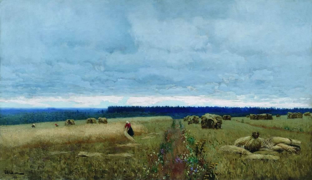 Сумрачный день. Жнивье